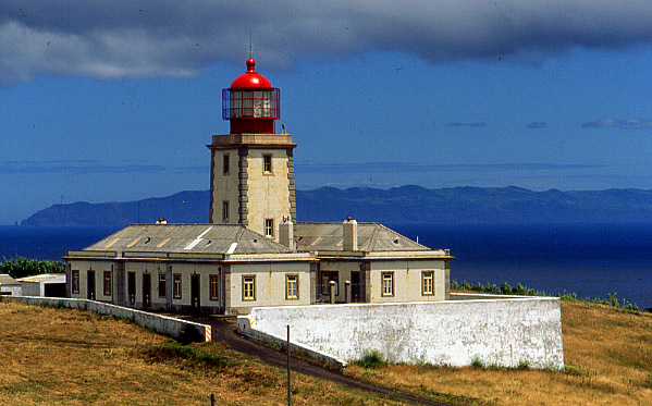 Farol da Ribeirinha, Faial, Açores.